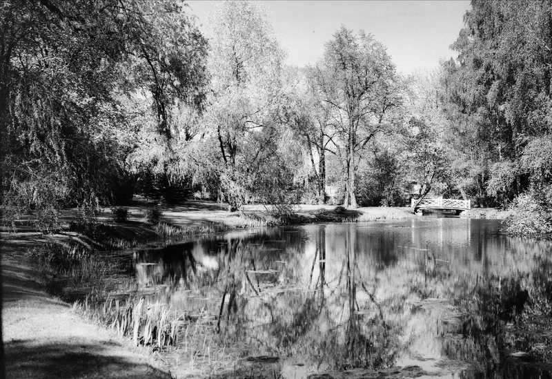 Bygdøy Kongsgård, hage, dam, bro.